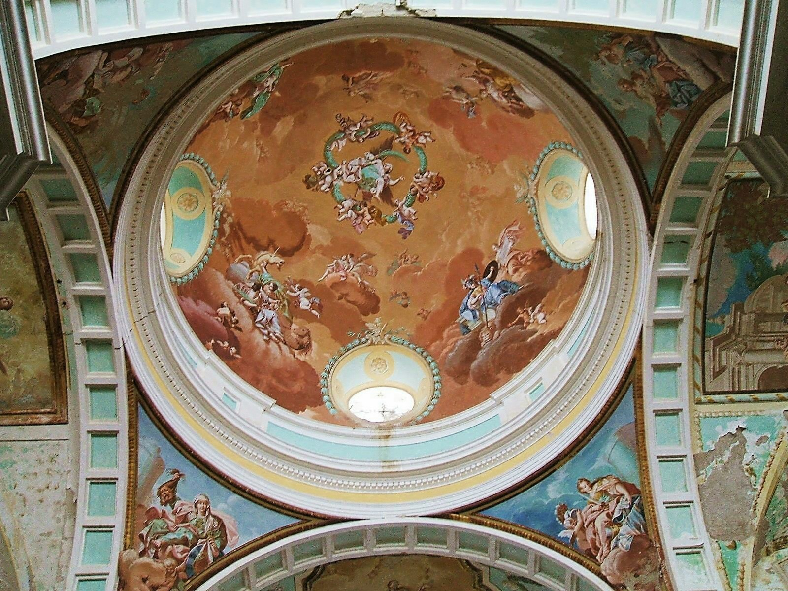 Bóveda de la iglesia de la Cartuja de Nuestra Señora de las Fuentes (Cartuja de Monegros), en el término municipal de Sariñena, Huesca, Aragón, España.